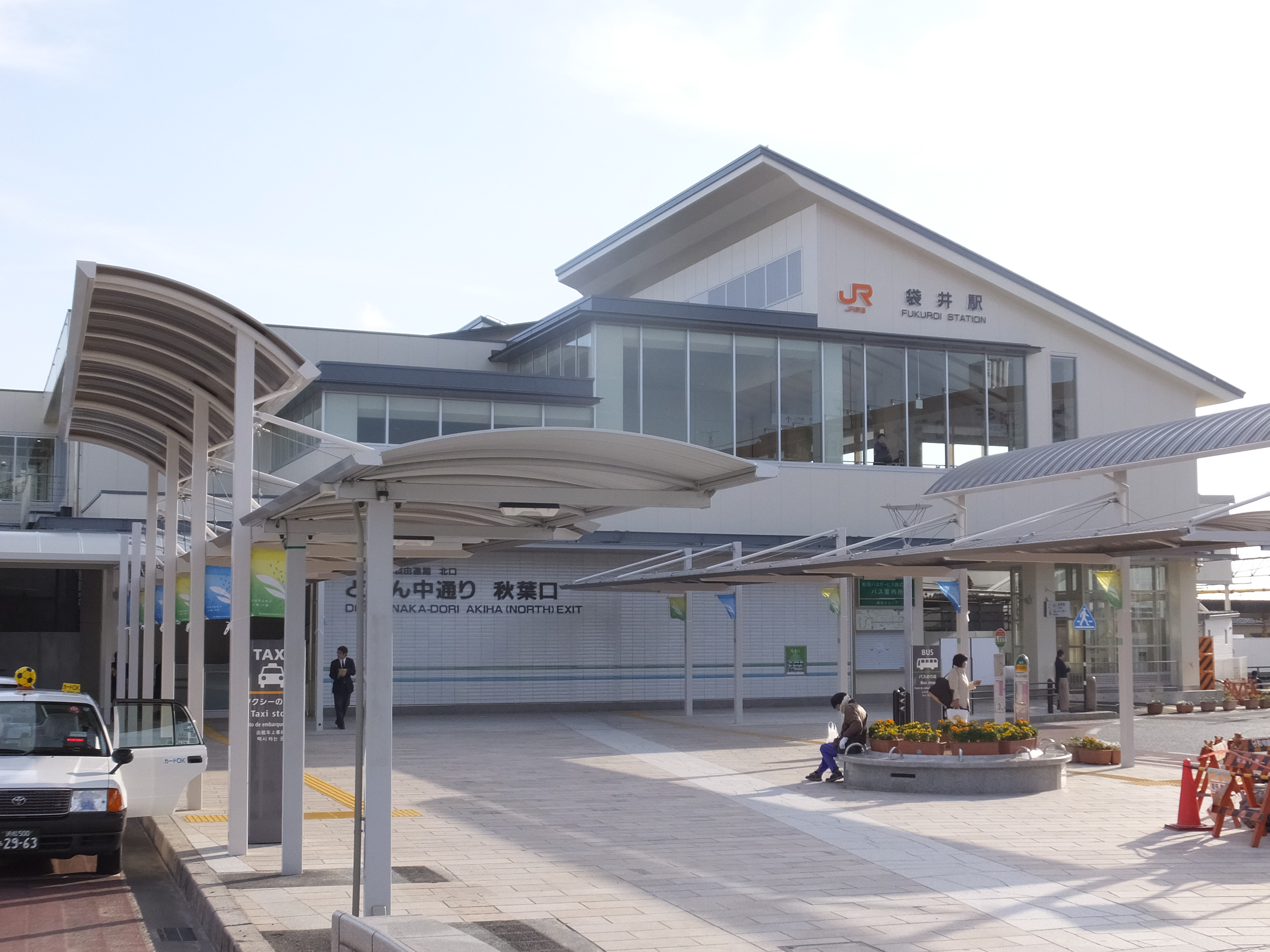 JR東海道本線 袋井駅駅舎北口（秋葉口）